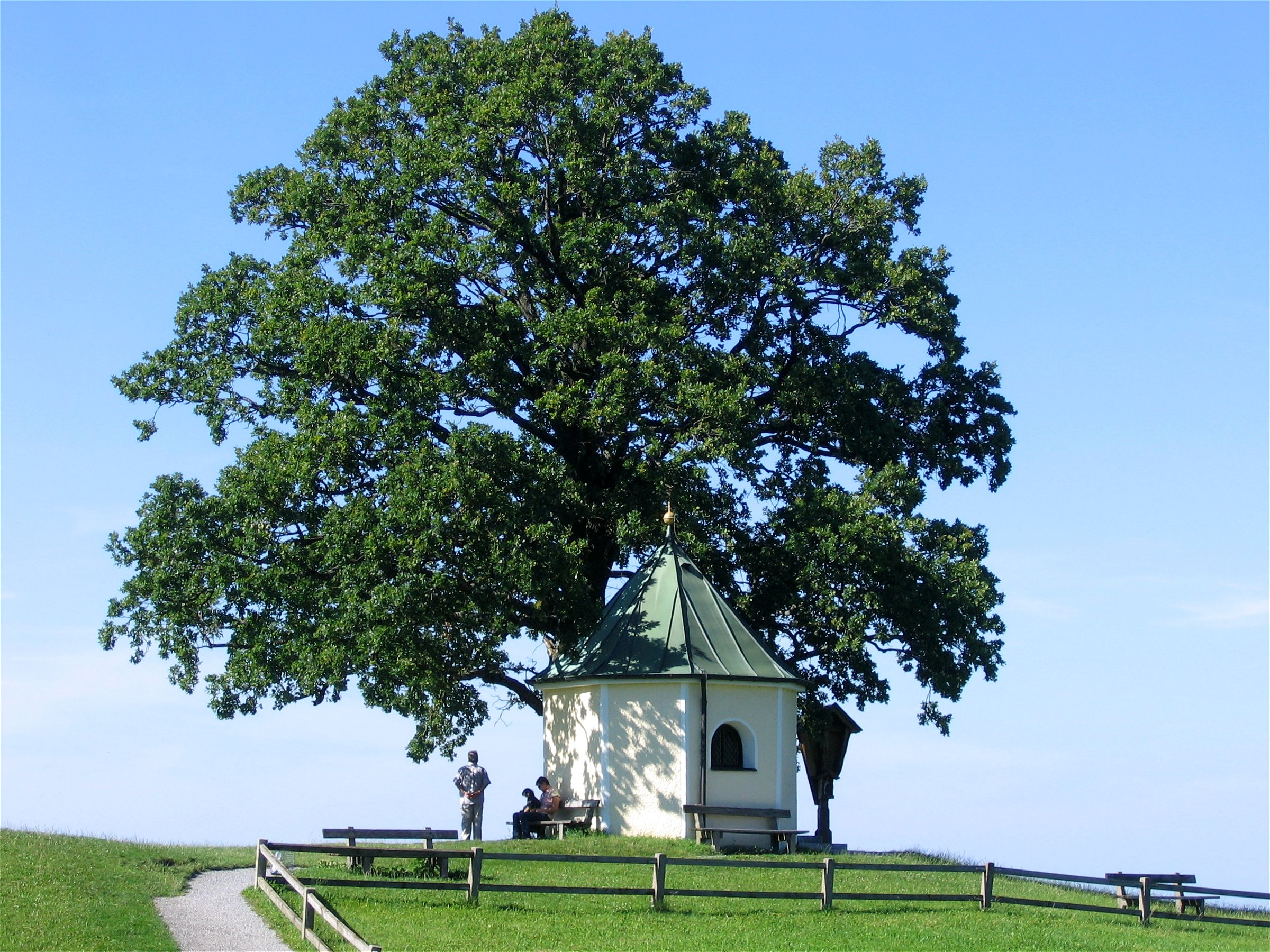 Kapelle in Obereck, Samerberg